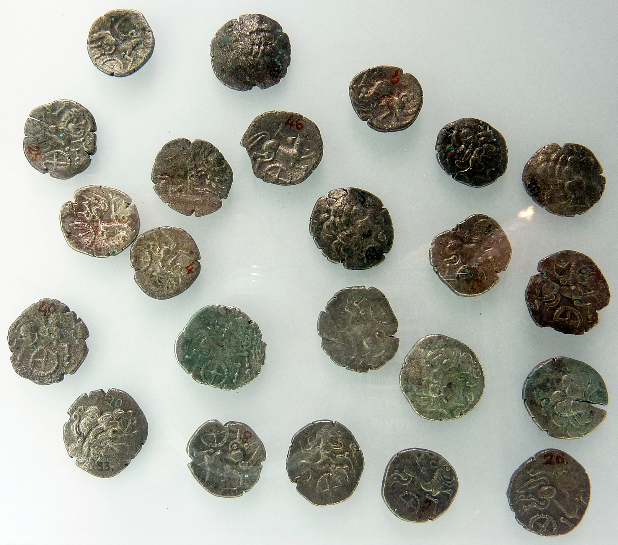 Trésor d'Amanlis (pièces faisant partie d'un dépôt monétaire d'environ 10 000 pièces trouvé en 1835 à Amanlis ; ces pièces en billon (un alliage d'argent et de cuivre) sont des statères attribués aux Vénètes et aux Riedones. L'avers des monnaies présente toujours une tête humaine, avec quelques variantes ; le revers un cheval à tête humaine (Musée d'histoire et d'archéologie de Vannes).